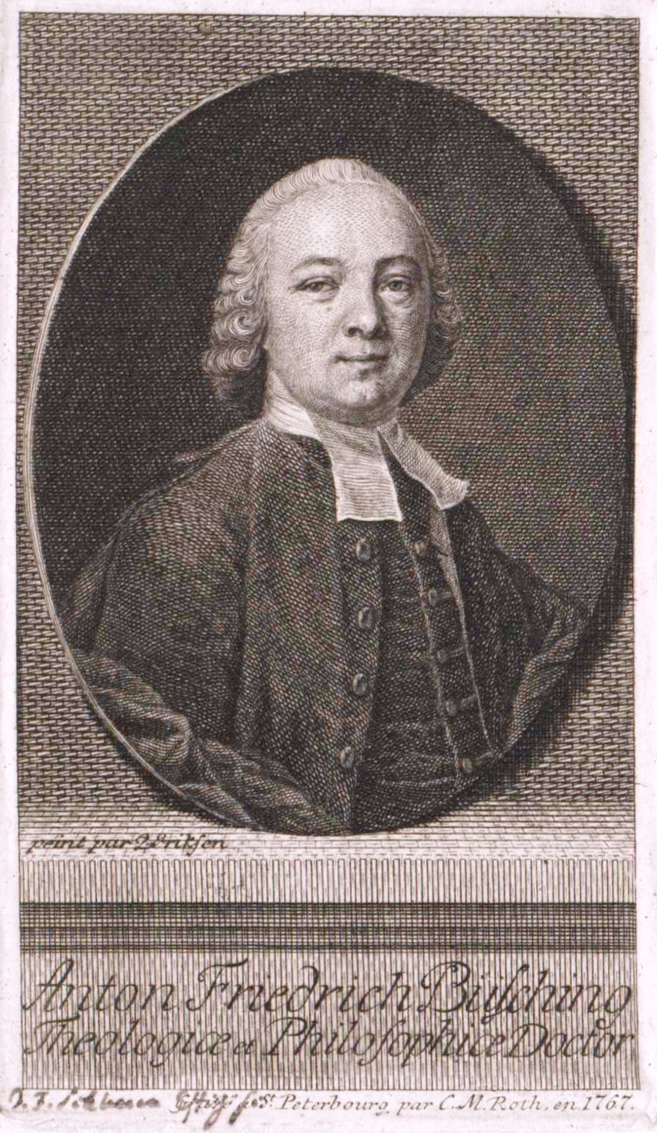 Der evangelischer Theologe und Geograph Anton Friedrich Büsching (1724-1793), Titelkupferstich